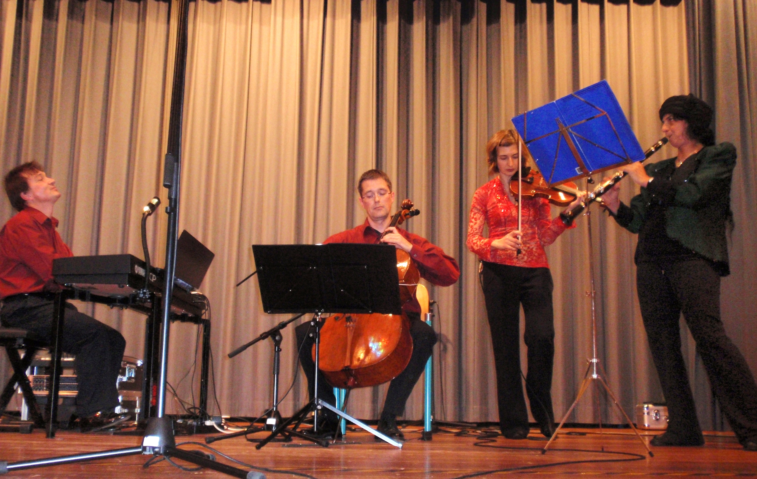 das Klezmer-Ensemble Colalaila im November 2008 während eines Konzerts in Alsbach-Hähnlein, Hessen